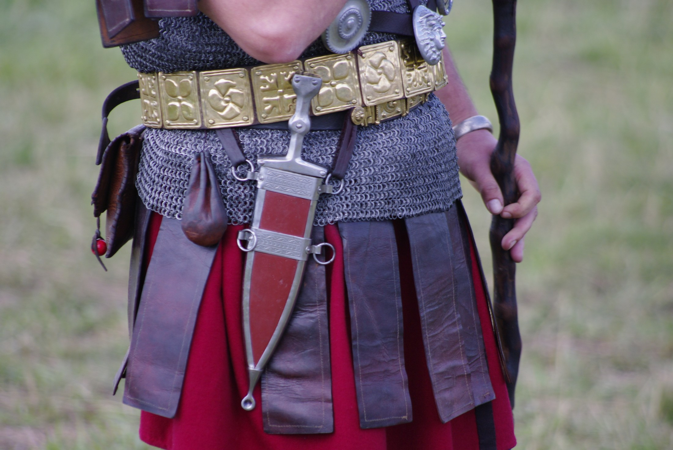 Détail de l'équipement d'un centurion romain : le pugio, poignard. Photographie réalisée lors de la 10ème édition des Arverniales le 24 juillet 2011 sur le plateau de Gergovie, Puy-de-Dôme.